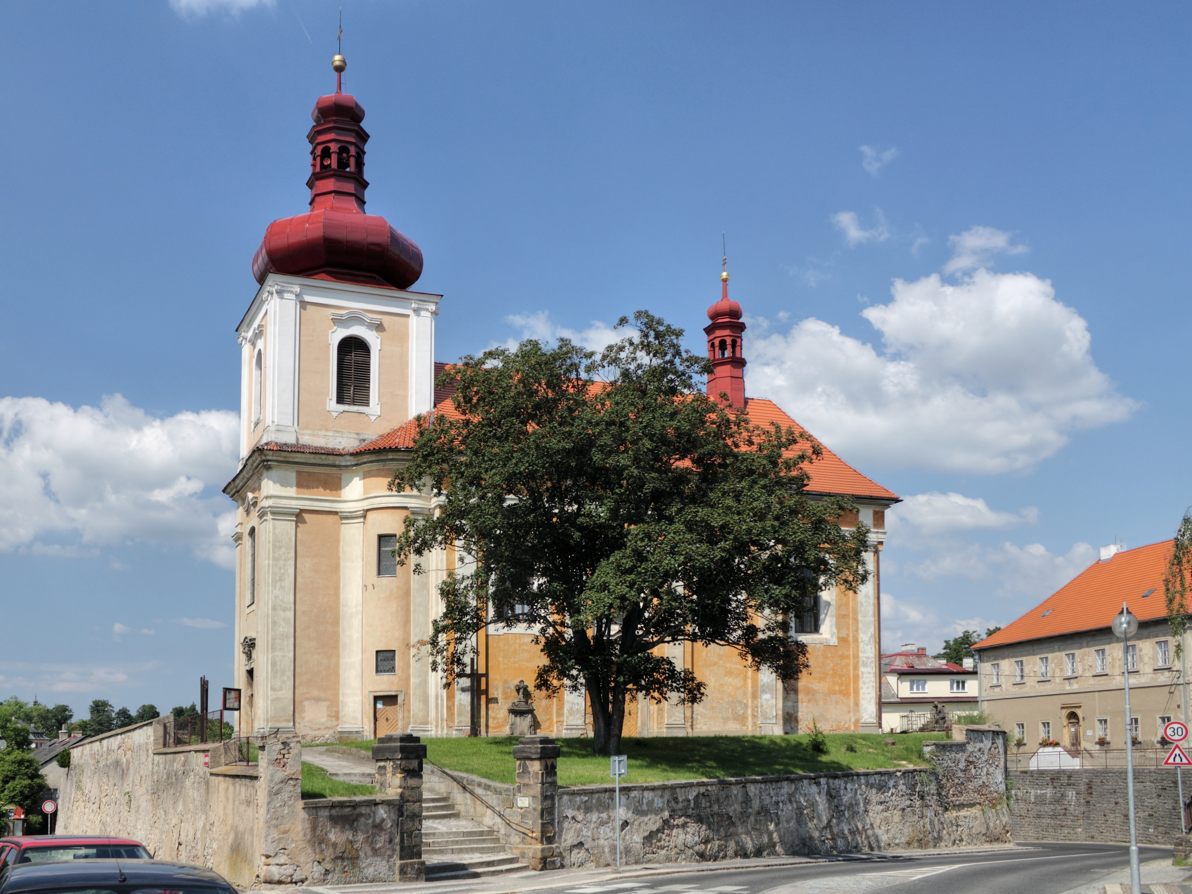 Kostel sv. Jakuba Většího (Mnichovo Hradiště), 1. máje, Mnichovo Hradiště